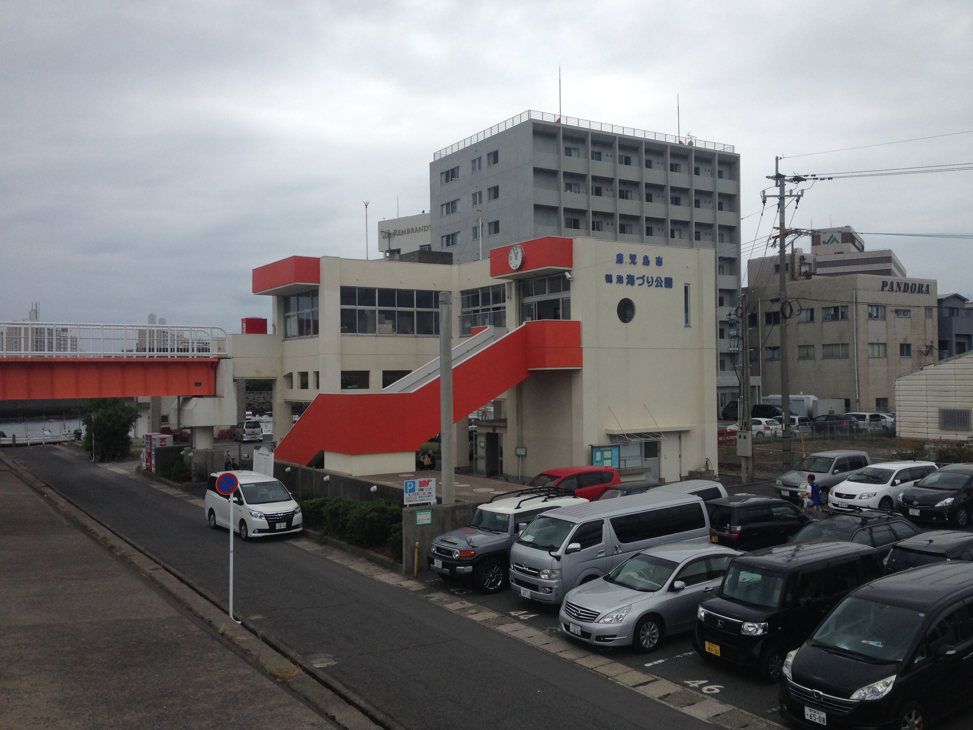 手ぶらで行ってもこの建物内に釣具レンタルと売店あります。